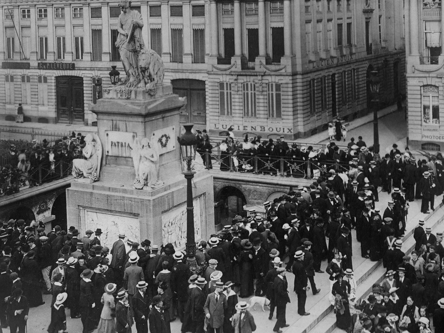 Protestviering Martelaarsplein